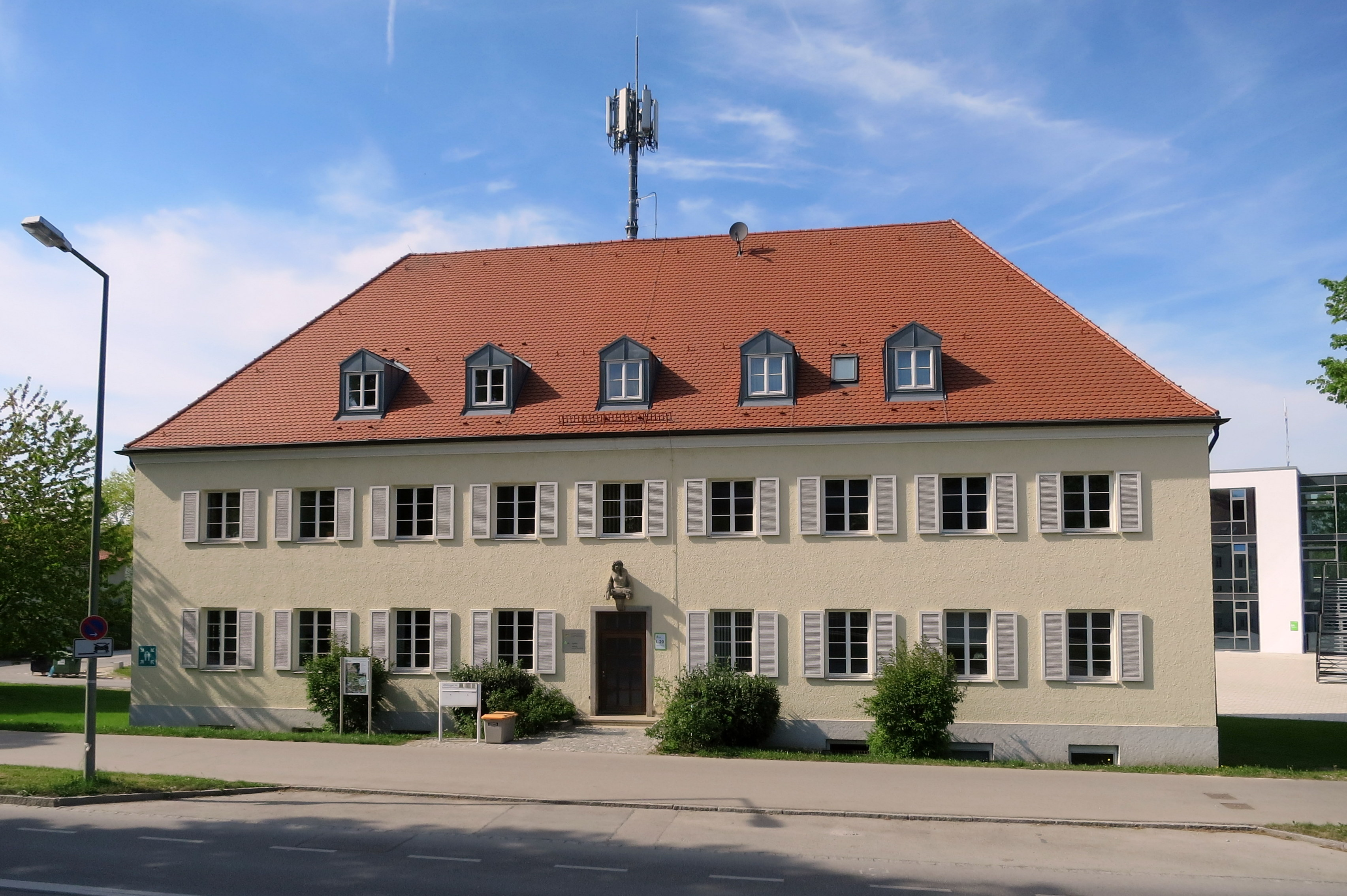 Sitz des Präsidenten der LfL 01